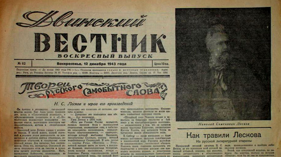 Двинский вестник, оккупационная немецкая газета.